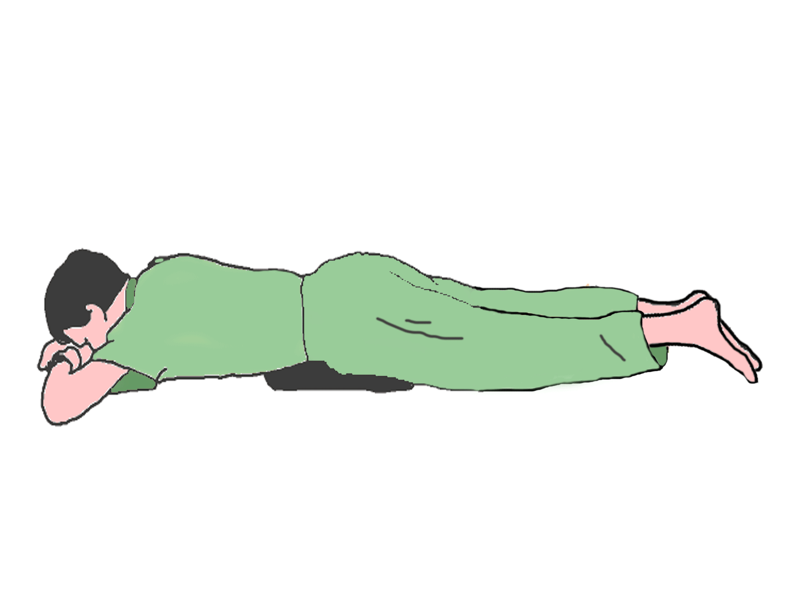 پوزیشن خوابیده به شکم